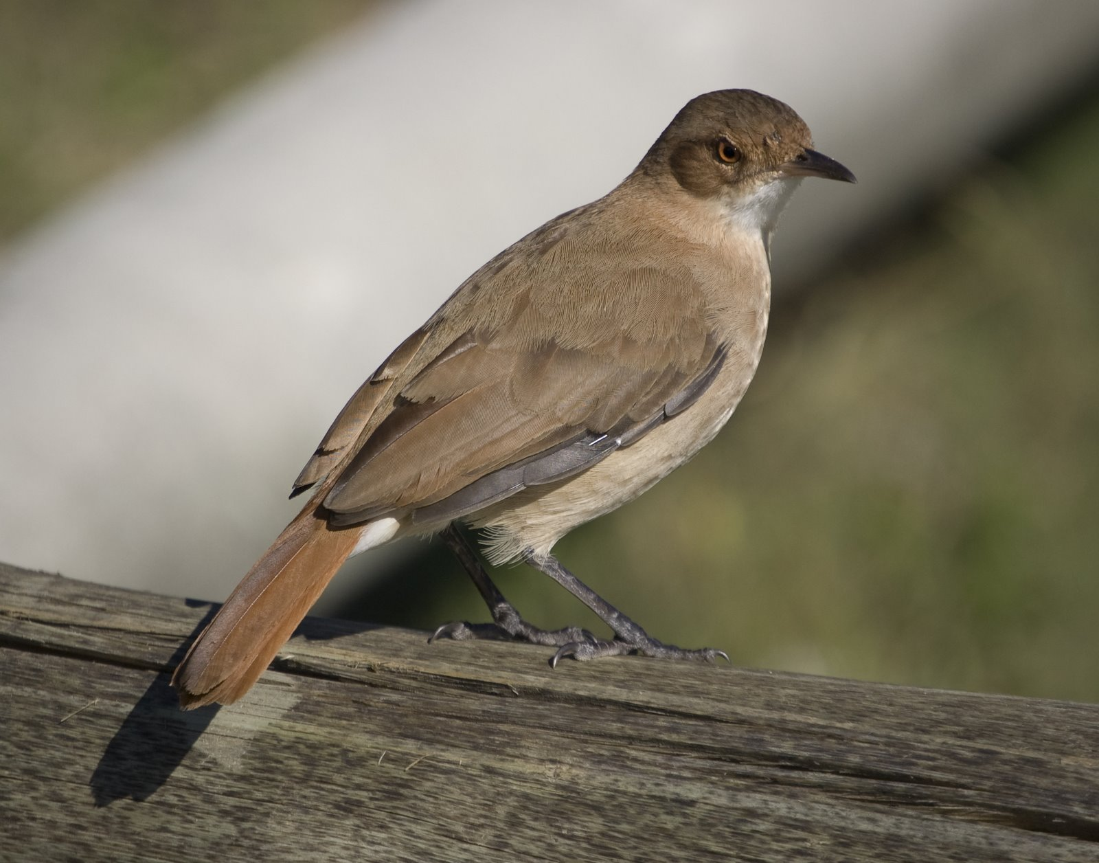 Furnarius rufus HORNERO